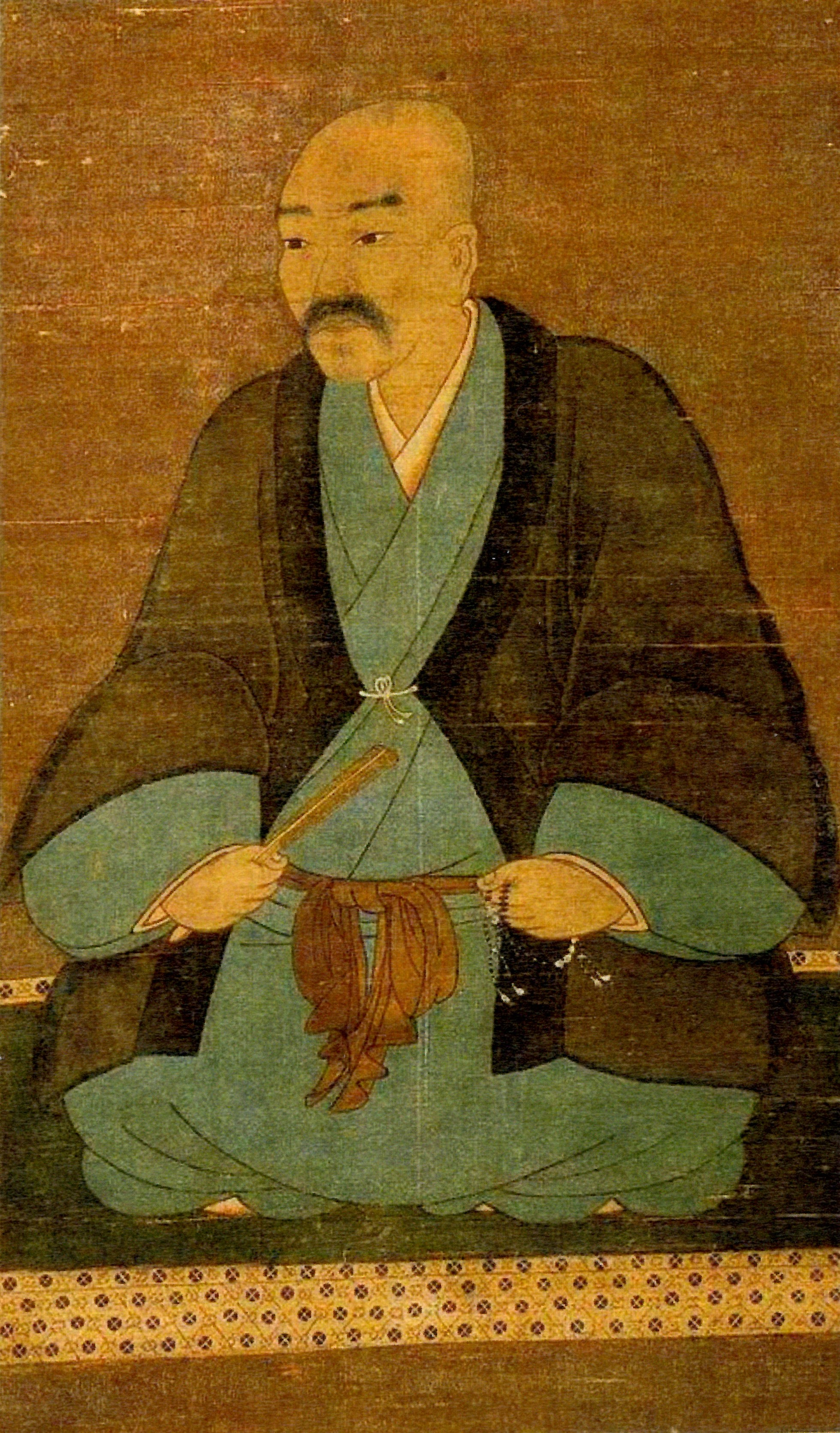 大隅国国人禰寝氏16代当主・禰寝重長の肖像画。